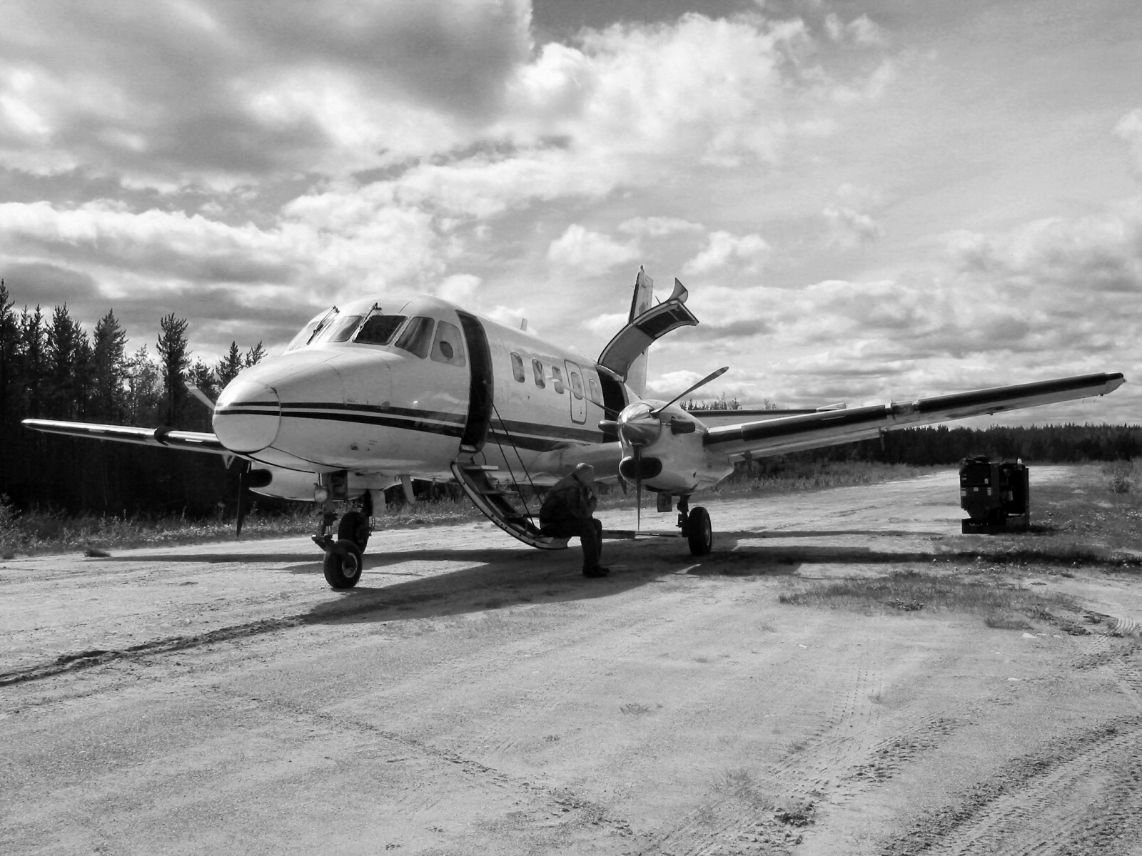 'Bandit' @ Gunisao Lake Lodge